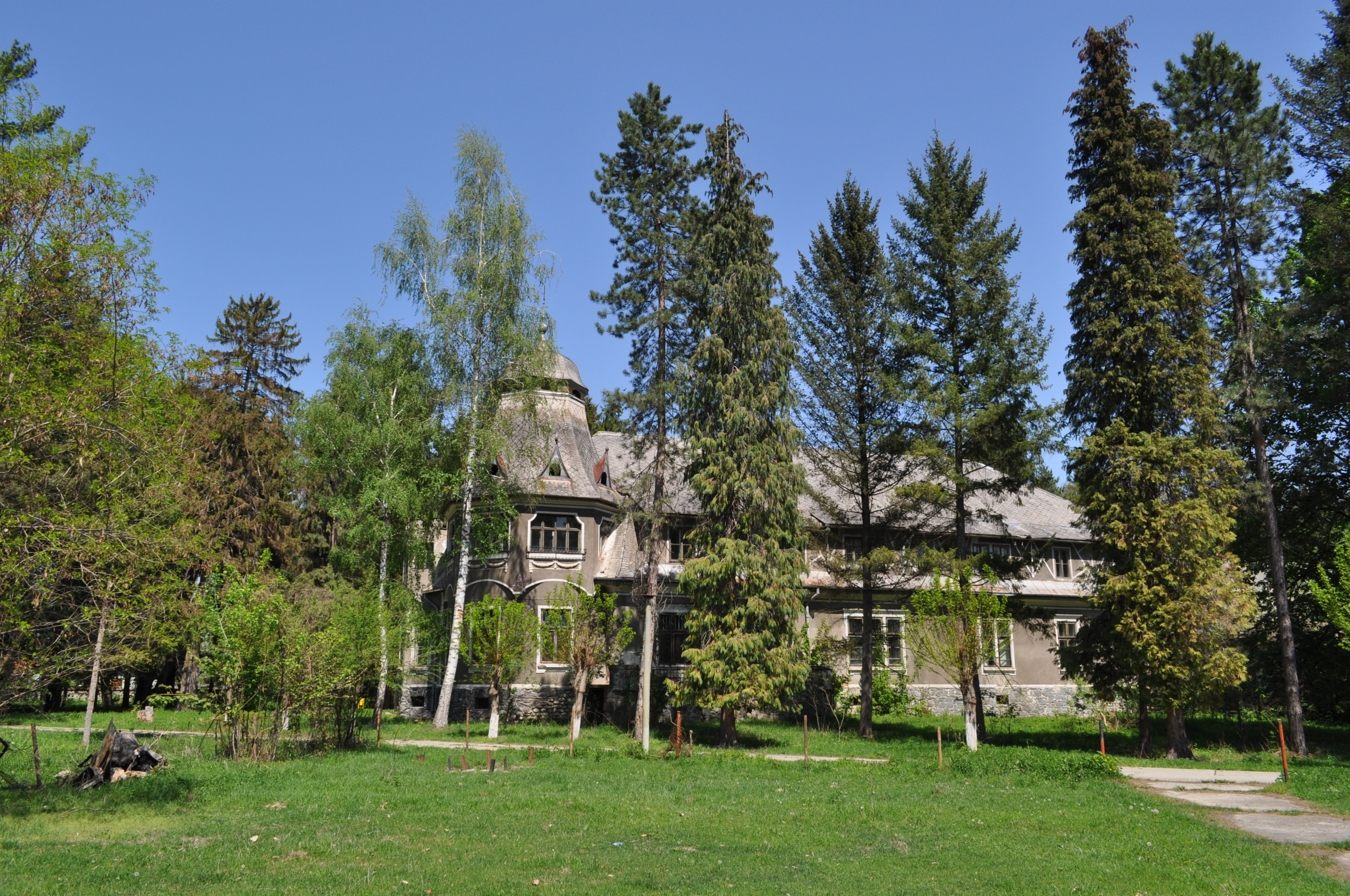 Castelul Pogany din satul PĂCLIŞA; comuna TOTEŞTI 01